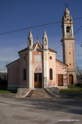 Chiesa